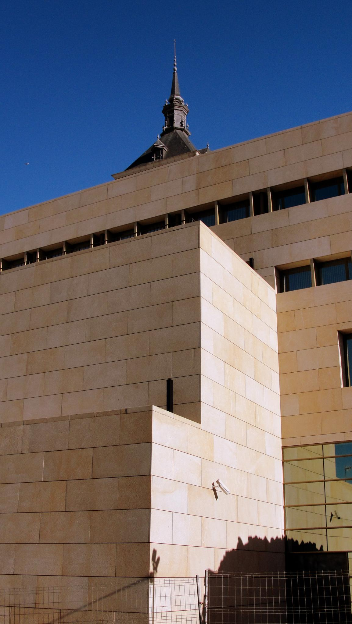 Vista parcial de la fachada principal del Museo del Ejército, situado en el Alcázar de Toledo, (España).